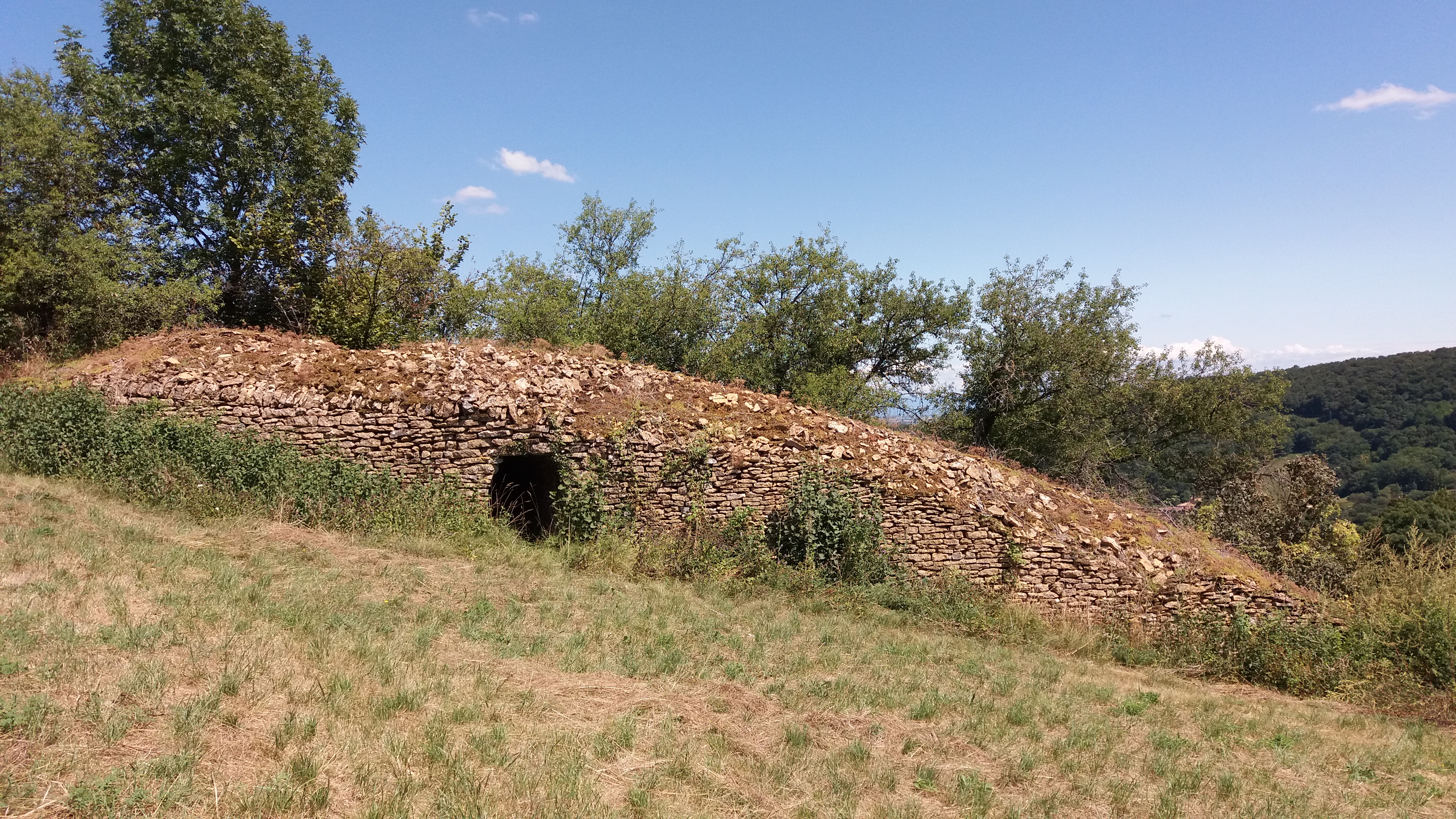 Caborne dans les environs de Poleymieux-au-Mont-d'Or.